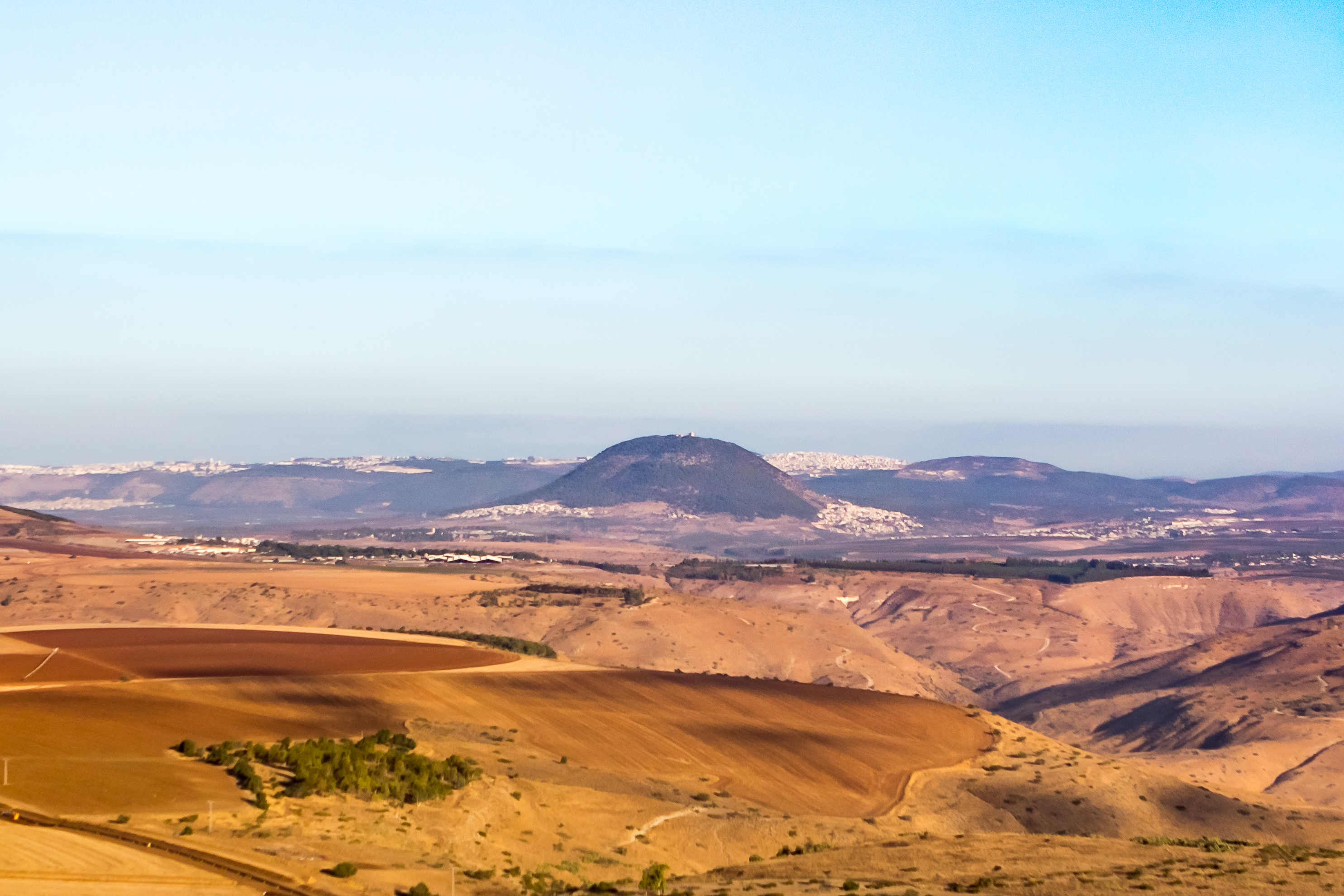 הַר תָּבוֹר הוא פסגה בולטת הממוקמת מדרום לרכס הרי נצרת ומצפון לעמק יזרעאל, והוא אחד ההרים הגבוהים בגליל התחתון. פסגתו נמצאת בגובה 562 מטר מעל פני הים והוא מתנשא לגובה של כ-400 מטרים מעל סביבתו. הפסגה בולטת ונראית גם לצופים בה ממקומות מרוחקים ברחבי הגליל והגולן. במבט מכפר תבור, ממזרח למערב, הפסגה נראית מחודדת מאד. במבט מדרום לצפון, מכיוון עפולה, הפסגה נראית מעוגלת ומתונה.